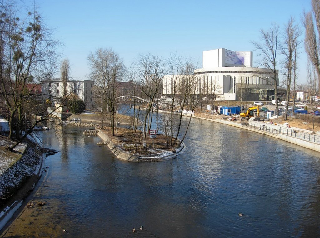 Wyspa św. Barbary w Bydgoszczy